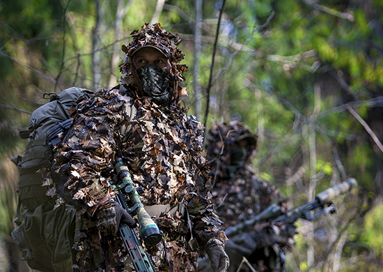 Подразделение специального назначения Вооруженных Силах России